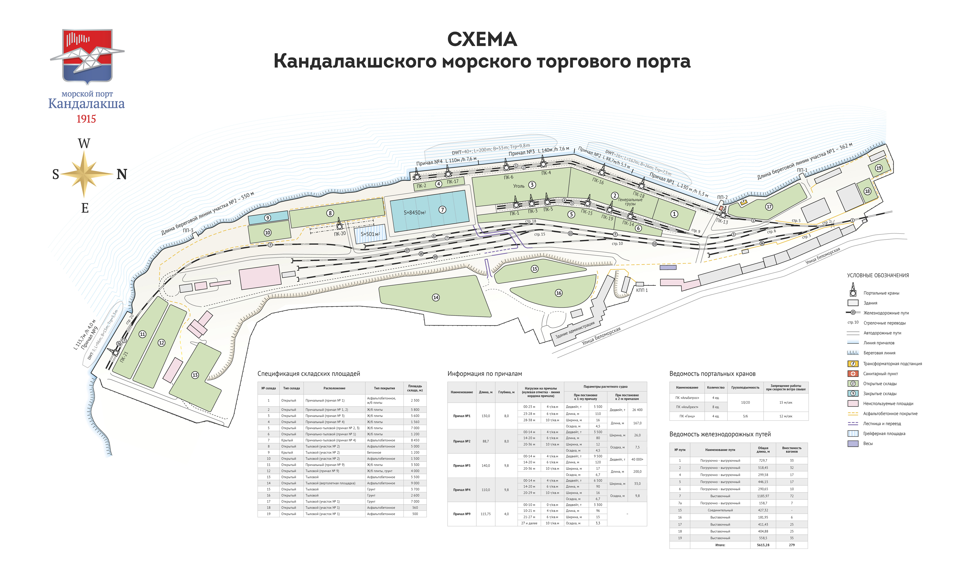 Схема кмтп